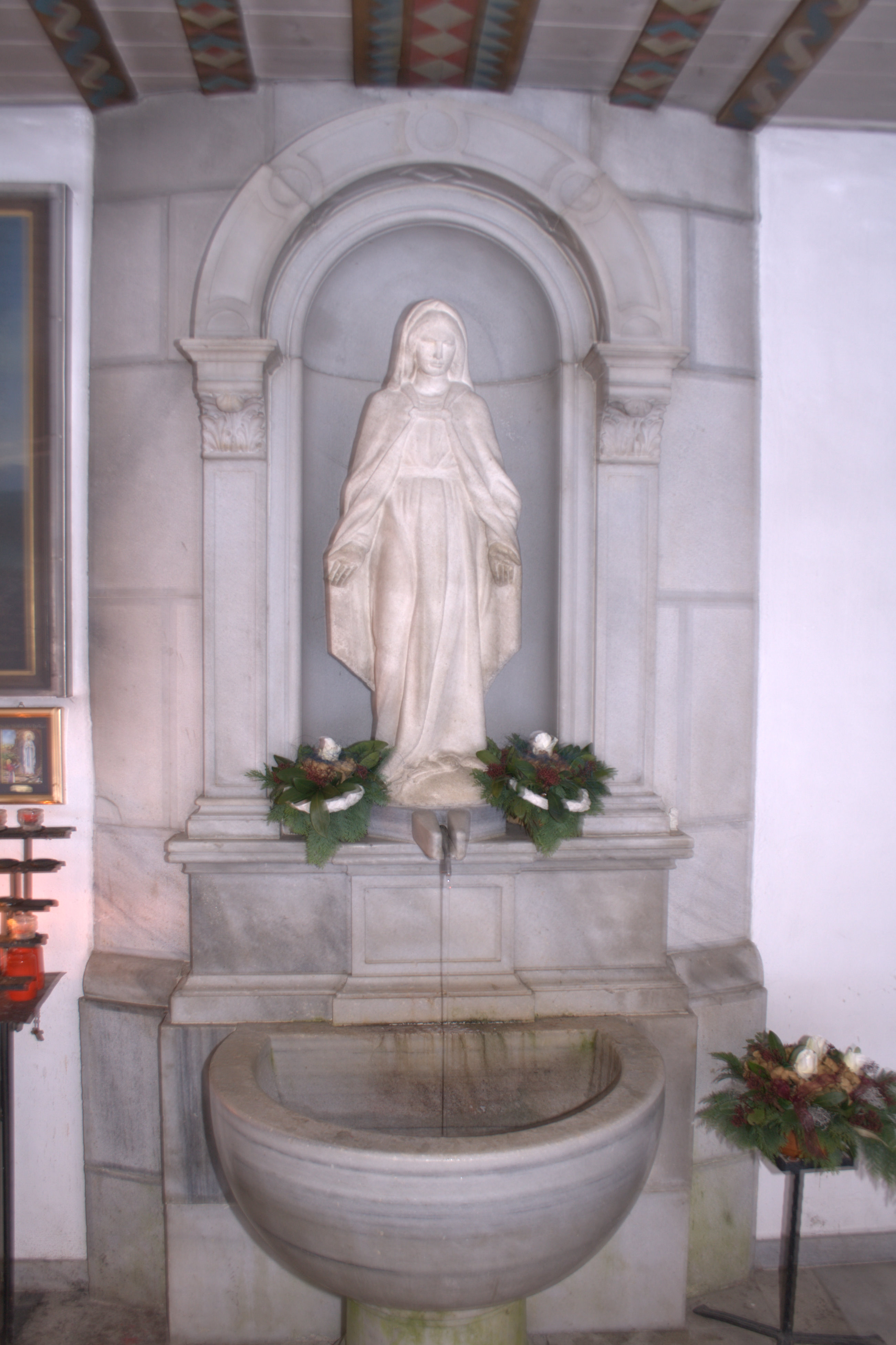 Maria Fieberbründl Brunnen